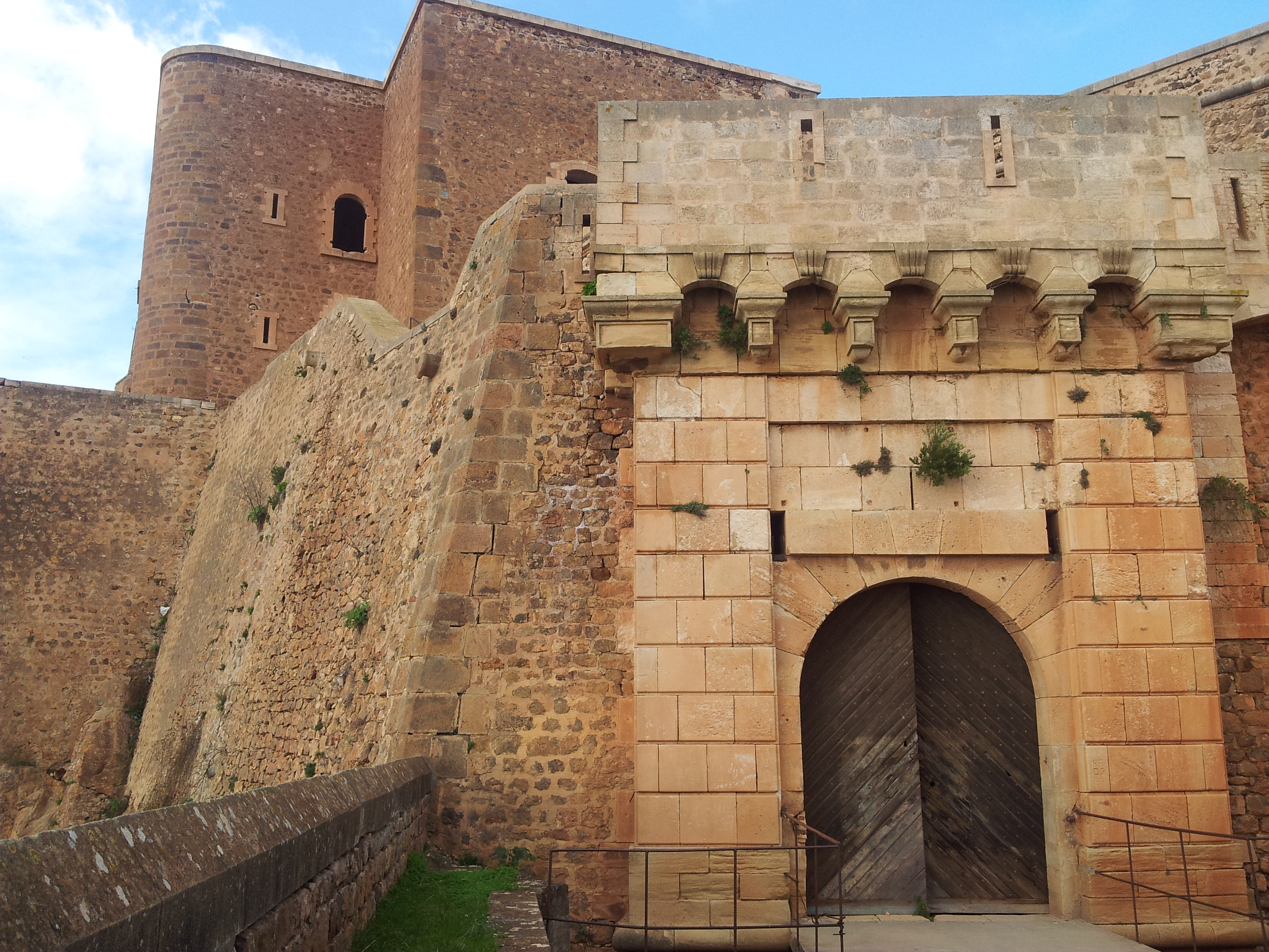 Porte d'entrée du Fort de Santa Cruz à Oran. (Algérie)